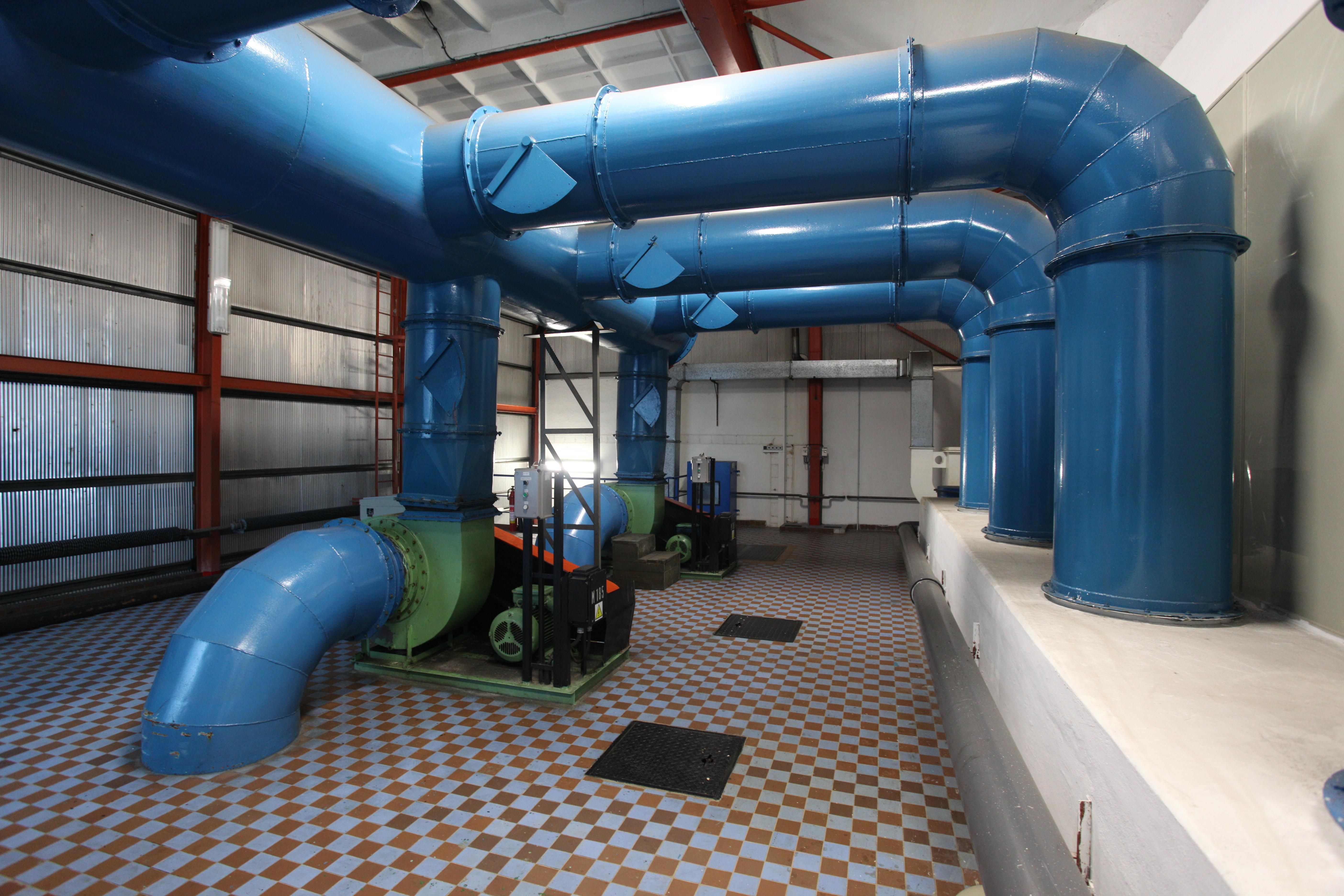 Trubky přihánějí vzduch do van aerační místnosti v odželezovně v úpravně vod v Káraném. Vzduch probublává tenkou vrstvičkou vody a zajišťuje tak přeměnu rozpuštěného dvojmocného železa na trojmocné a jeho vyvločkování. Vločky železa je pak možno následně zachytit pískovým filtrem. Při aeraci vody se též z vody odstraní různé plyny. Nová odželezovna artéské vody funguje v úpravně vody Káraný od roku 1978. Artéská voda je jímána ze 7 vrtů o hloubce 60-80 m východně od obce Káraný a násoskou (= vzduchotěsné potrubí dopravující vodu, díky podtlaku tvořenému vývěvou) přiváděny do odželezovny v úpravně vod Káraný. Tato voda pochází ze zvodně (= souvislá akumulace podzemní vody v propustném horizontu) cenomanských (= časová jednotka svrchní křídy vymezující období před 99,6-93,5 miliony let) pískovců o mocnosti 20-30 m překrytých vrstvou nepropustných slínovců. Označení artéská voda pochází z francouzské provincie Artois, kde byla obdobná voda čerpána mnichy kartuziánského řádu ve 12. století. Voda do Polabí přitéká propustnými pískovci shora od Ještědského hřbetu. Rychlost je však malá, stáří vody bylo odhadnuto na 14 000 let. Zdroje: Křivánek, Oldřich a Kněžek, Miroslav. 2001. Zdroje pitné vody v Káraném. Principy získávání vody v oblasti káranské vodárny. Pražské vodovody a kanalizace a.s. Wikipedie Ambrožová, Jana. 2007. Aplikovaná a technická hydrobiologie. VŠCHT